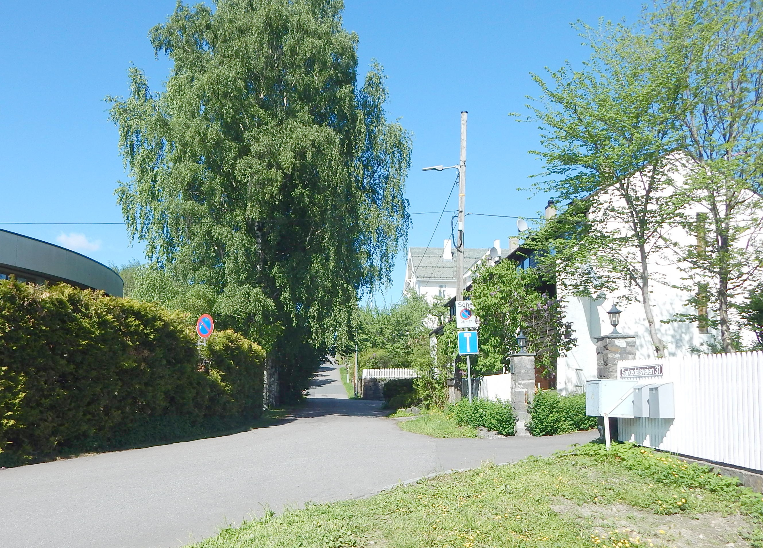 Tårnveien